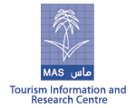 MAS logo